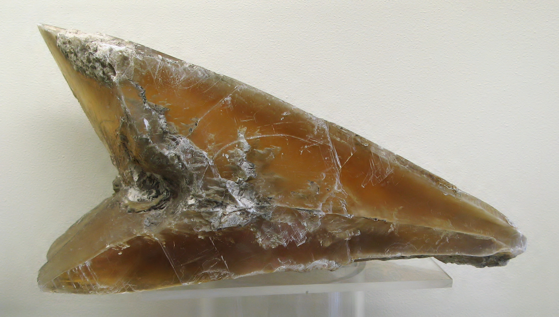 Gips (Schwalbenschwanz-Zwilling) - Ausgestellt im Mineralogischen Museum Bonn